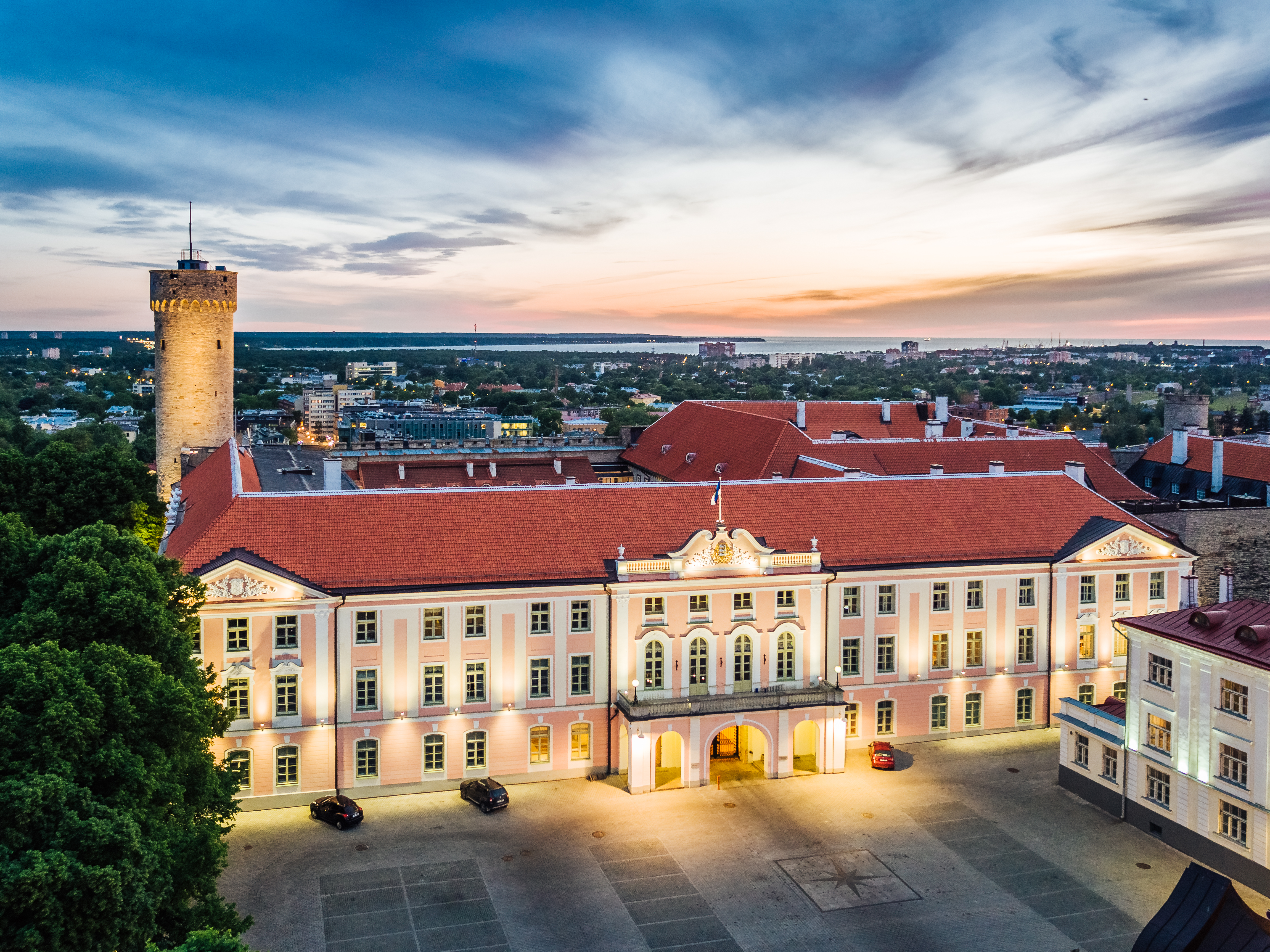 Riigikogu hoone.